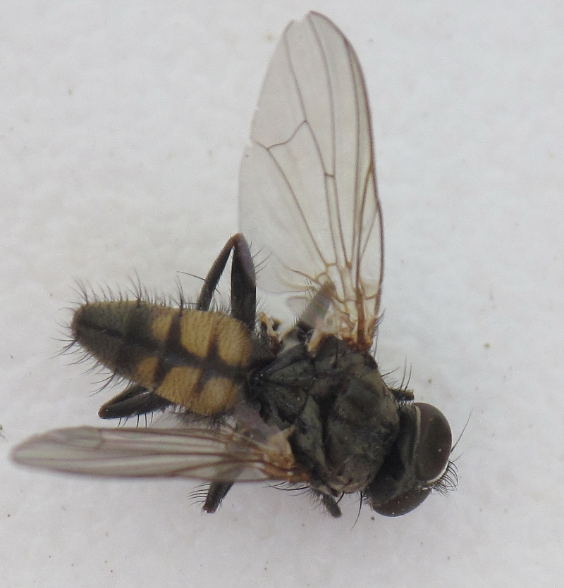 Mosca afogada en Bastavales, Brión, Galiza.Fannia canicularis Male